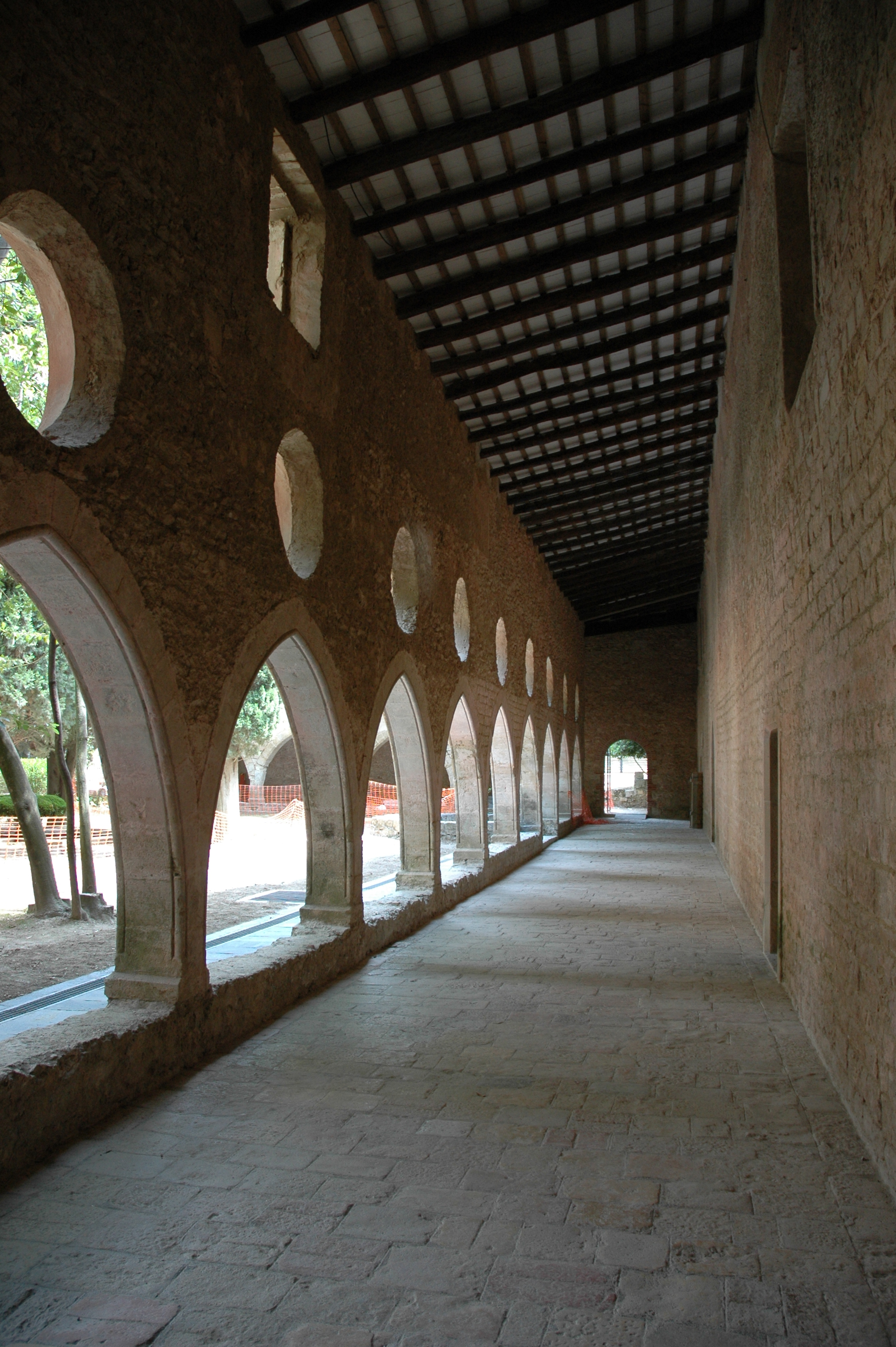 Monestir de Santes Creus - Claustre posterior